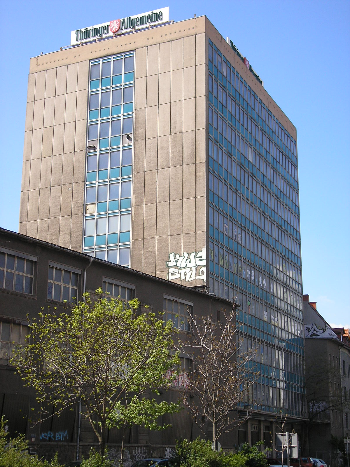 Das ehemalige Hochhaus der Thüringer Allgemeinen am Juri-Gagarin-Ring in Erfurt (Thüringen).